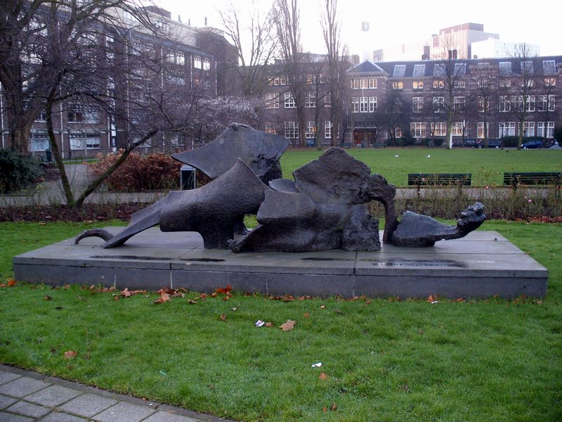 Sculpture "Kunstenaarsverzet 1940-1945" (artists resistance) by Carel Kneulman in 1973 at the Plantage Middenlaan in Amsterdam/The Netherlands in memory of Gerrit van der Veen.